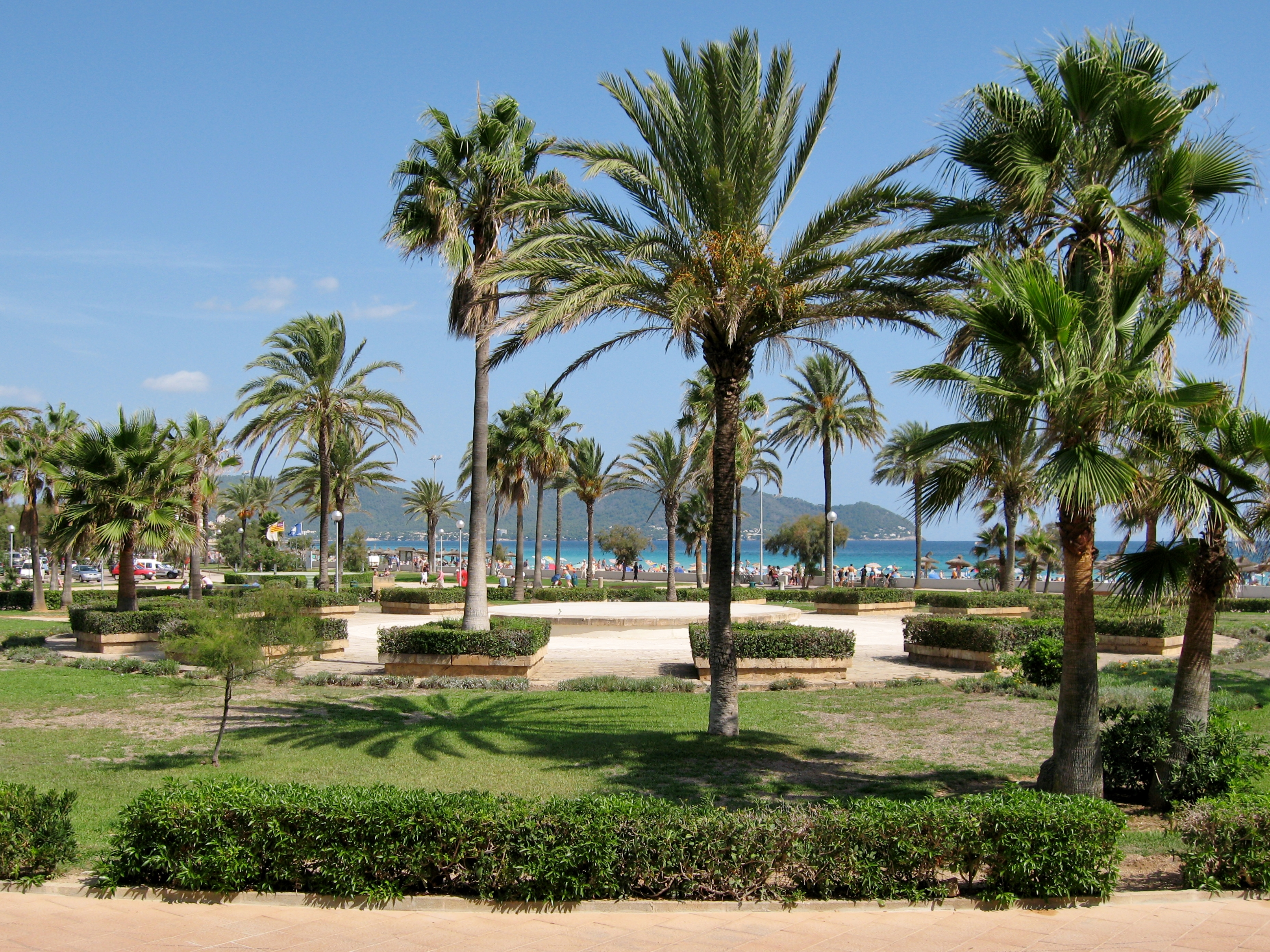 Parc de la Mar, Cala Millor, Sant Llorenç des Cardassar, Mallorca, Spain